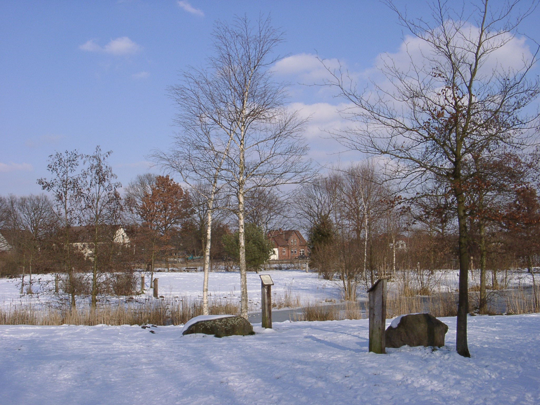 Garbsen, Stadtpark im Winter. 2005-03-04